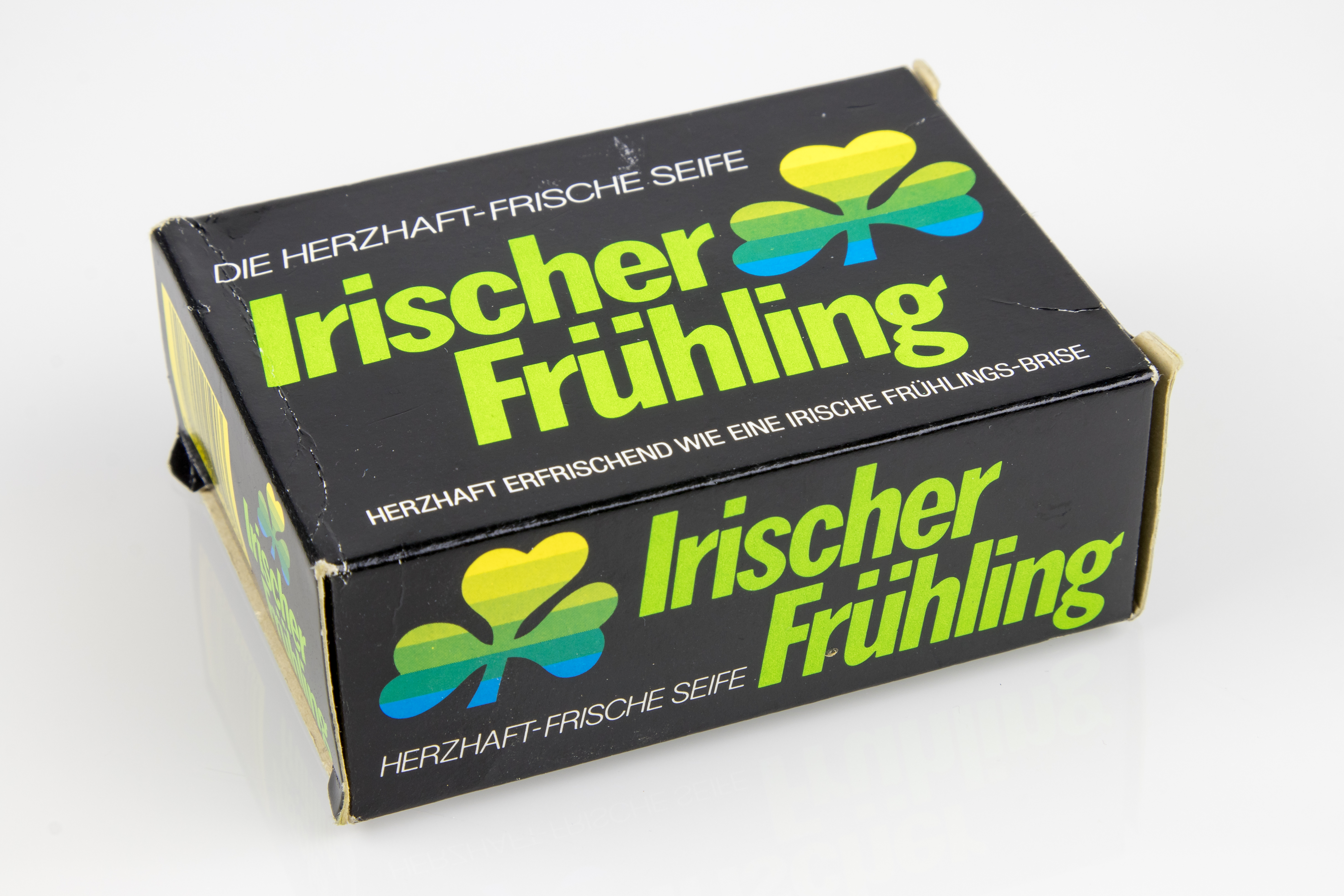 Seife "Irischer Frühling". Packung